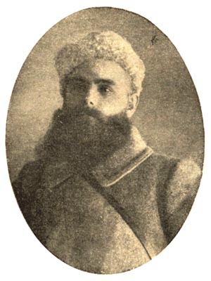 Фотопортрет Ивана Наумовича Дубового